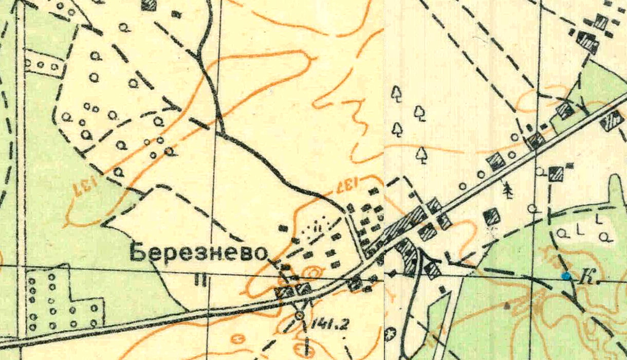 Топографическая карта Ленинградской области, квадрат О-35-24-А-г (Горки), деревня Березнево